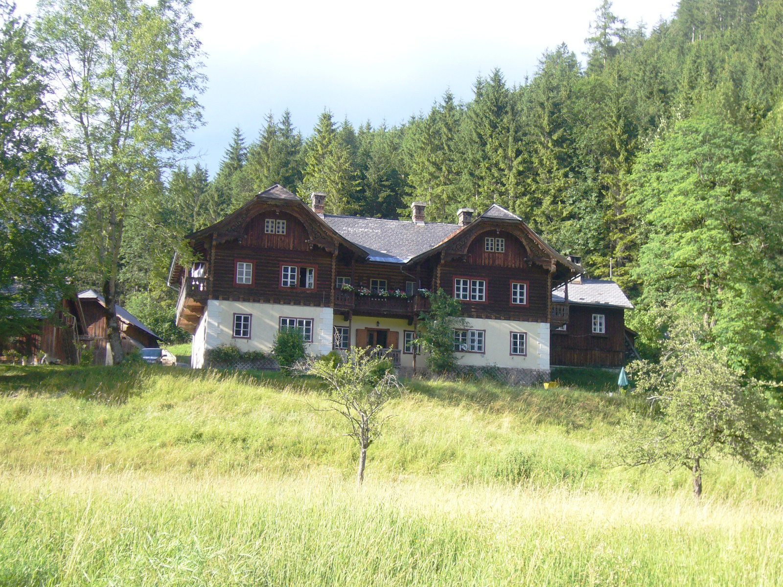 rothschildhaus